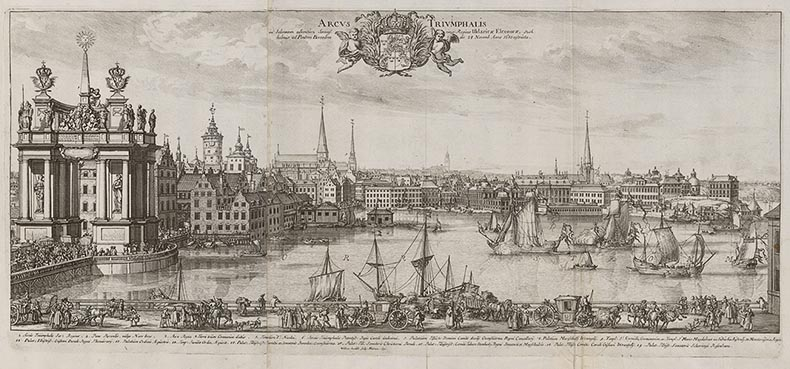 Arcus Triumphalis in Solennem adventum Serenissimae Reginae Uldaricae Eleonorae, Stockholmiae ad Pontem Borealem die 24 Novemb Anno 1680 extructa : [Bild] / Willem Swidde Sculp. Triumfbåge rest på Norrbro i Stockholm den 24 november 1680 vid den höga drottning Ulrika Eleonoras högtidliga intåg